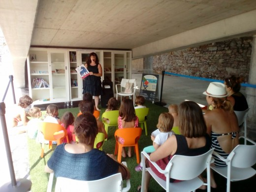 Donostiako Eguzkitekako ipuin kontaketa saioa Lur Kortarekin.